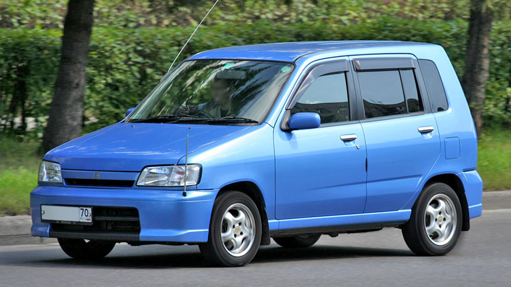 Photo taken in Seversk, Russia